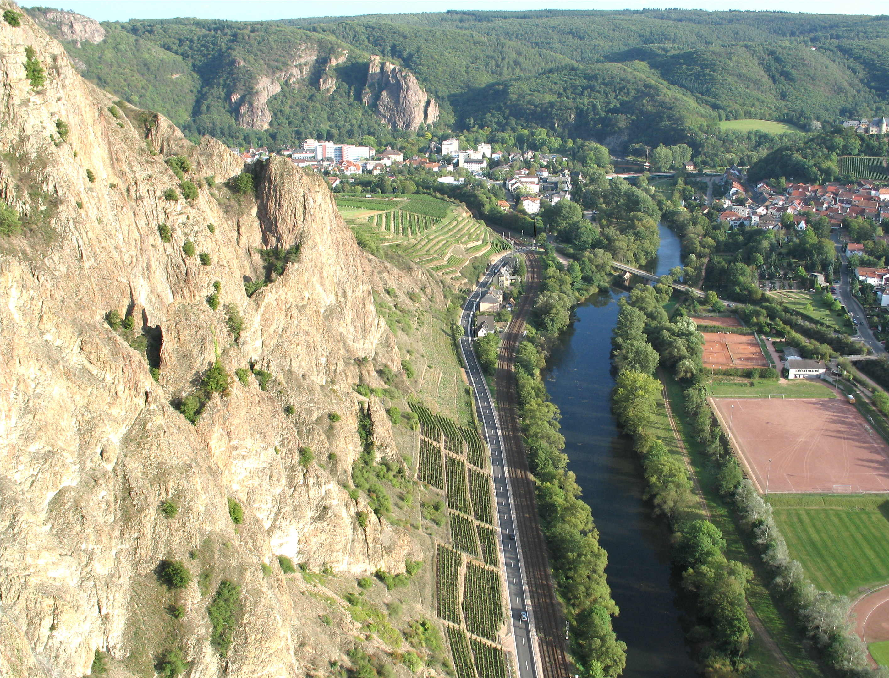 Vue vum Rotenfels op Bad Münster am Stein-Ebernburg